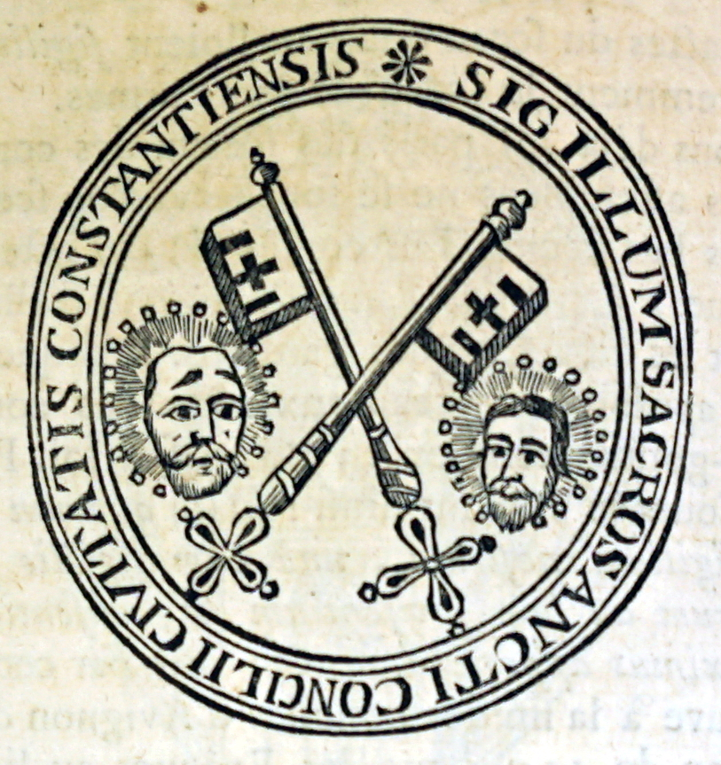 extrait de "Nouveau traité de diplomatique...".